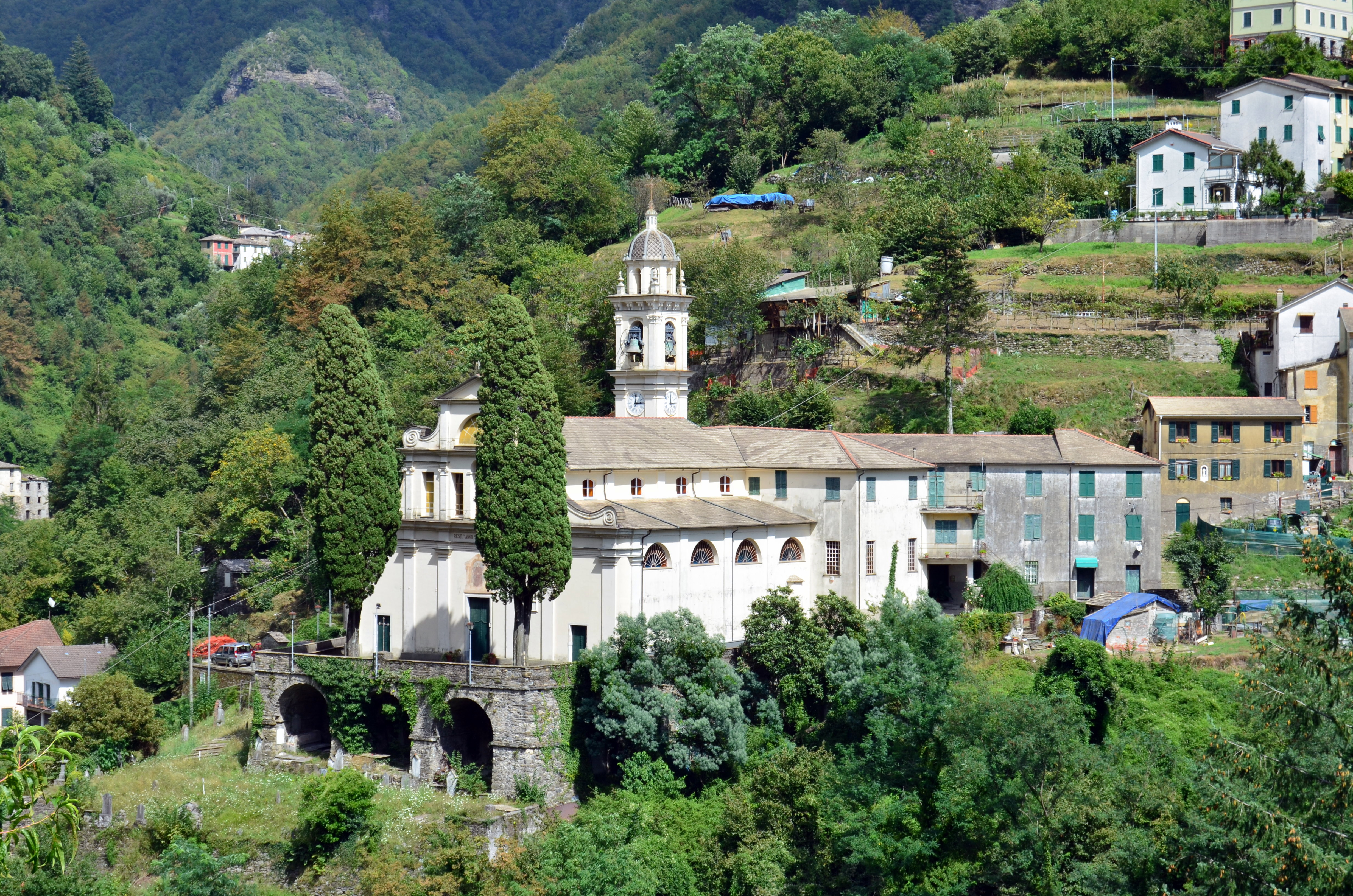 Santuario di Nostra Signora del Rosario, Favale di Malvaro, Liguria, Italia